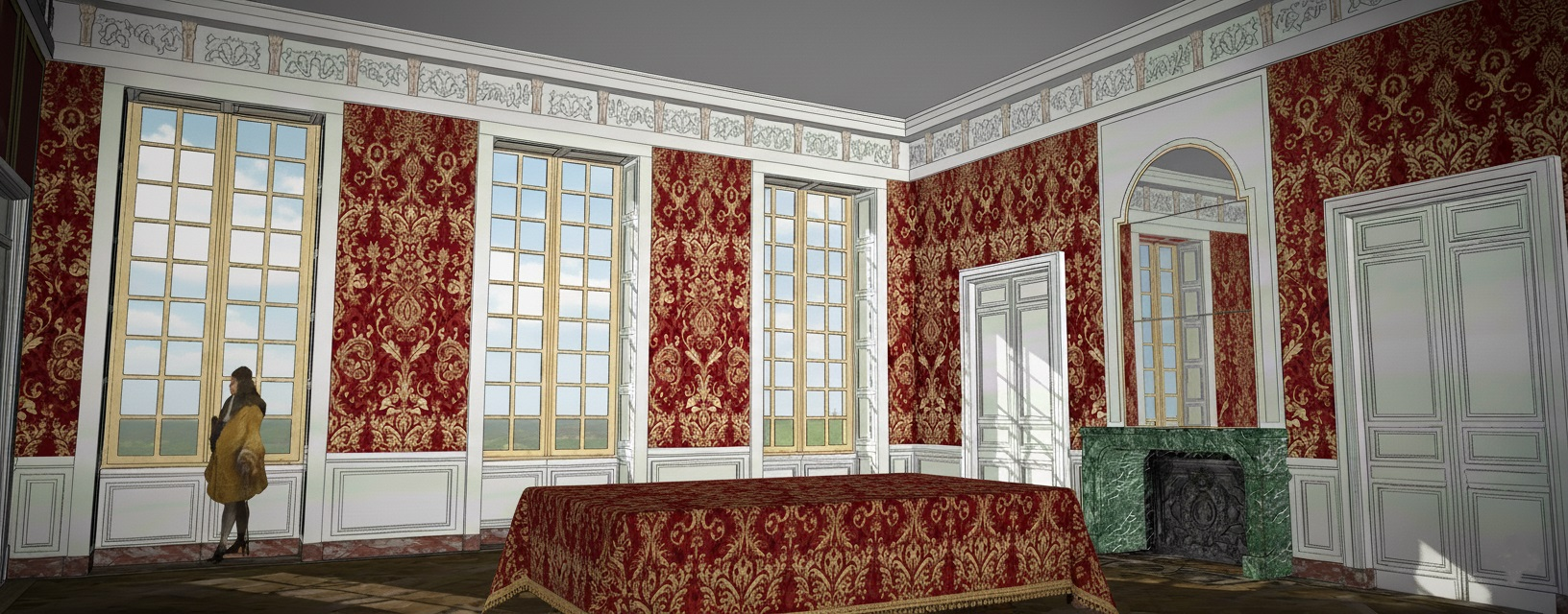 Essai de restitution de l'antichambre de Louis XIV au premier étage du château-vieux de Meudon, servant de salle du Conseil. Vers 1696-1711.